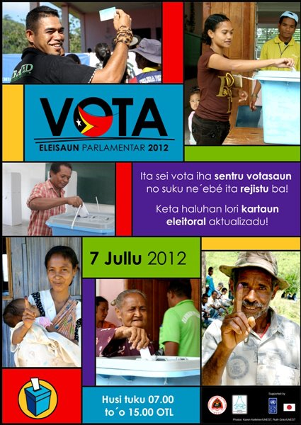 Wählerinformation zu den Parlamentswahlen 2012